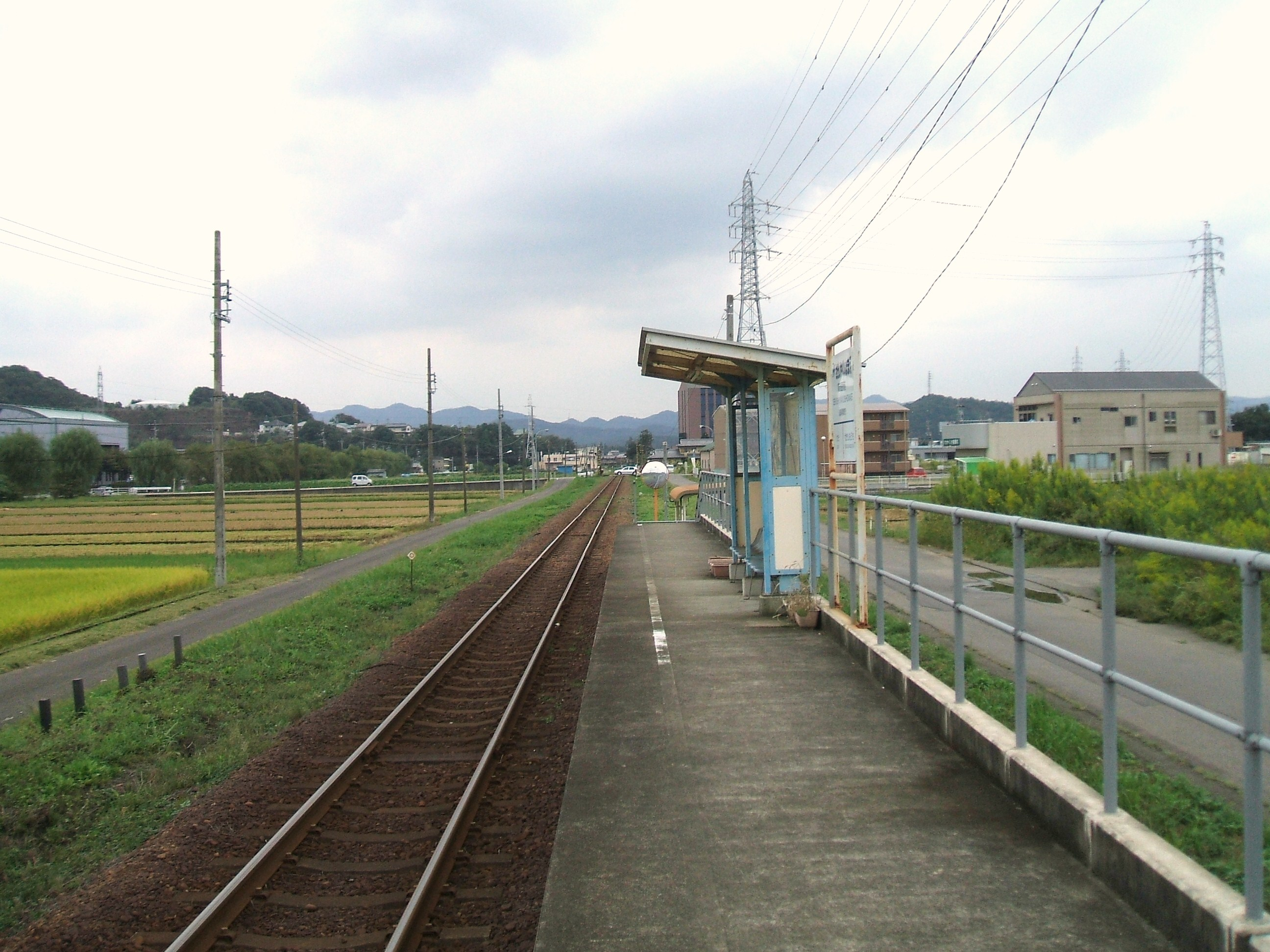 ホームの様子。